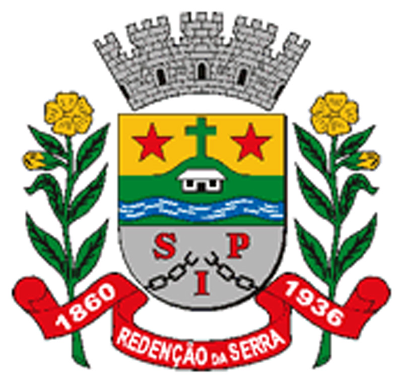 Brasão da cidade Redenção da Serra, São Paulo, Brasil